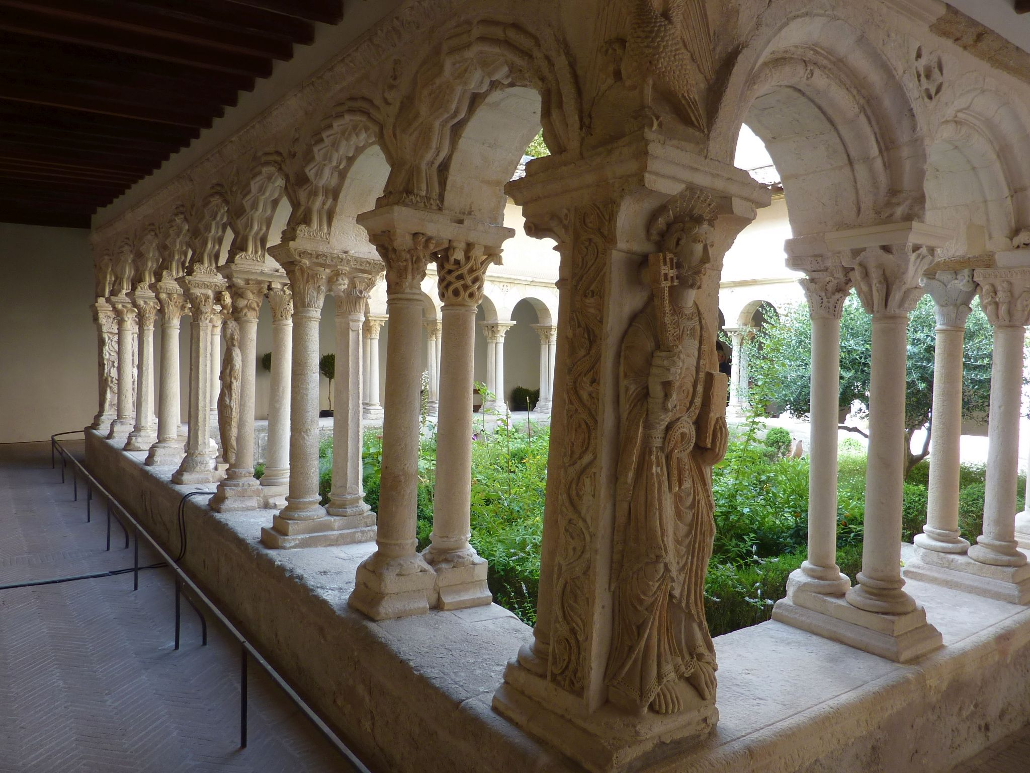 Cloître de Saint-Sauveur d'Aix-en-Provence